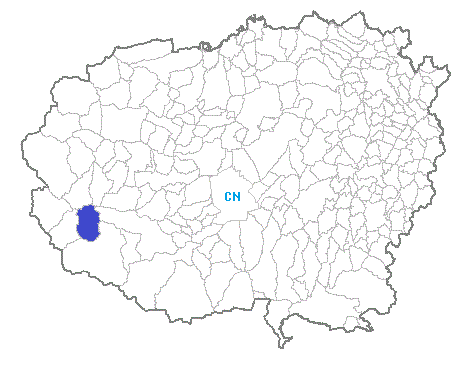 Posizione del comune nella provincia di Cuneo